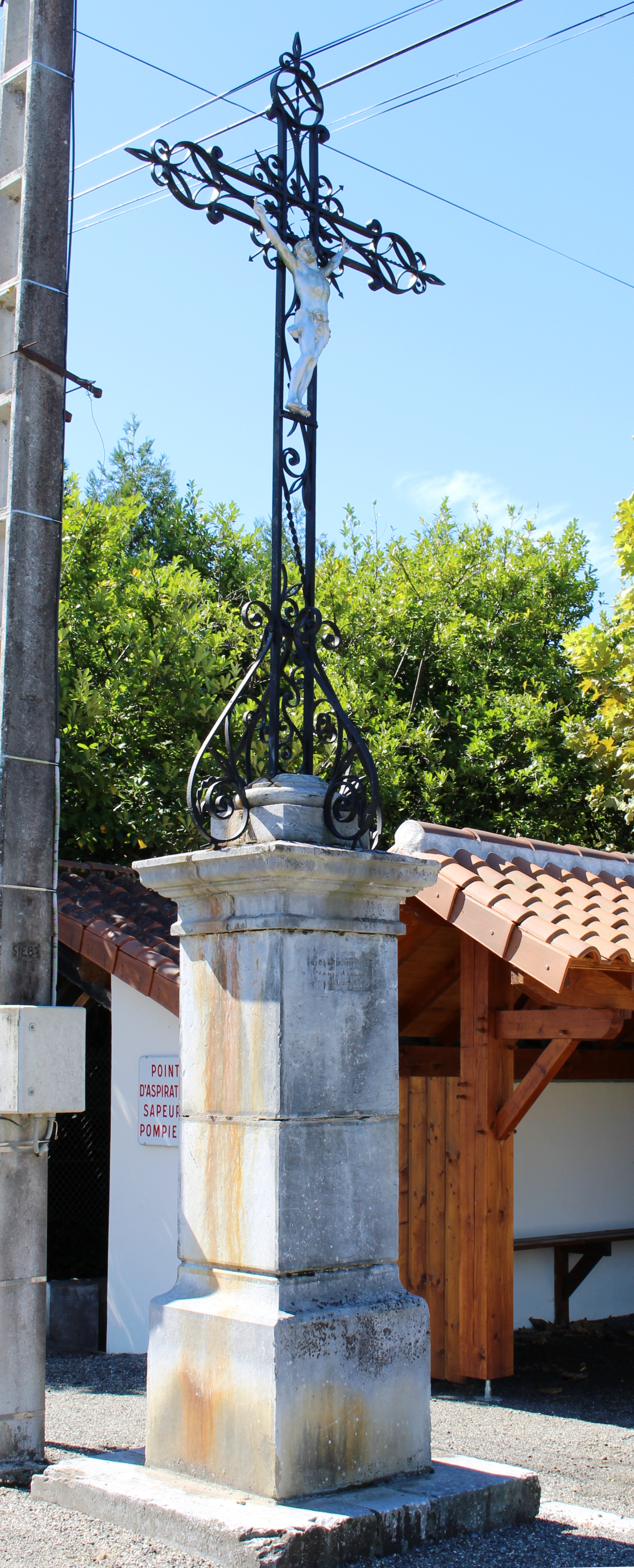 Croix de Gensac (Hautes-Pyrénées)